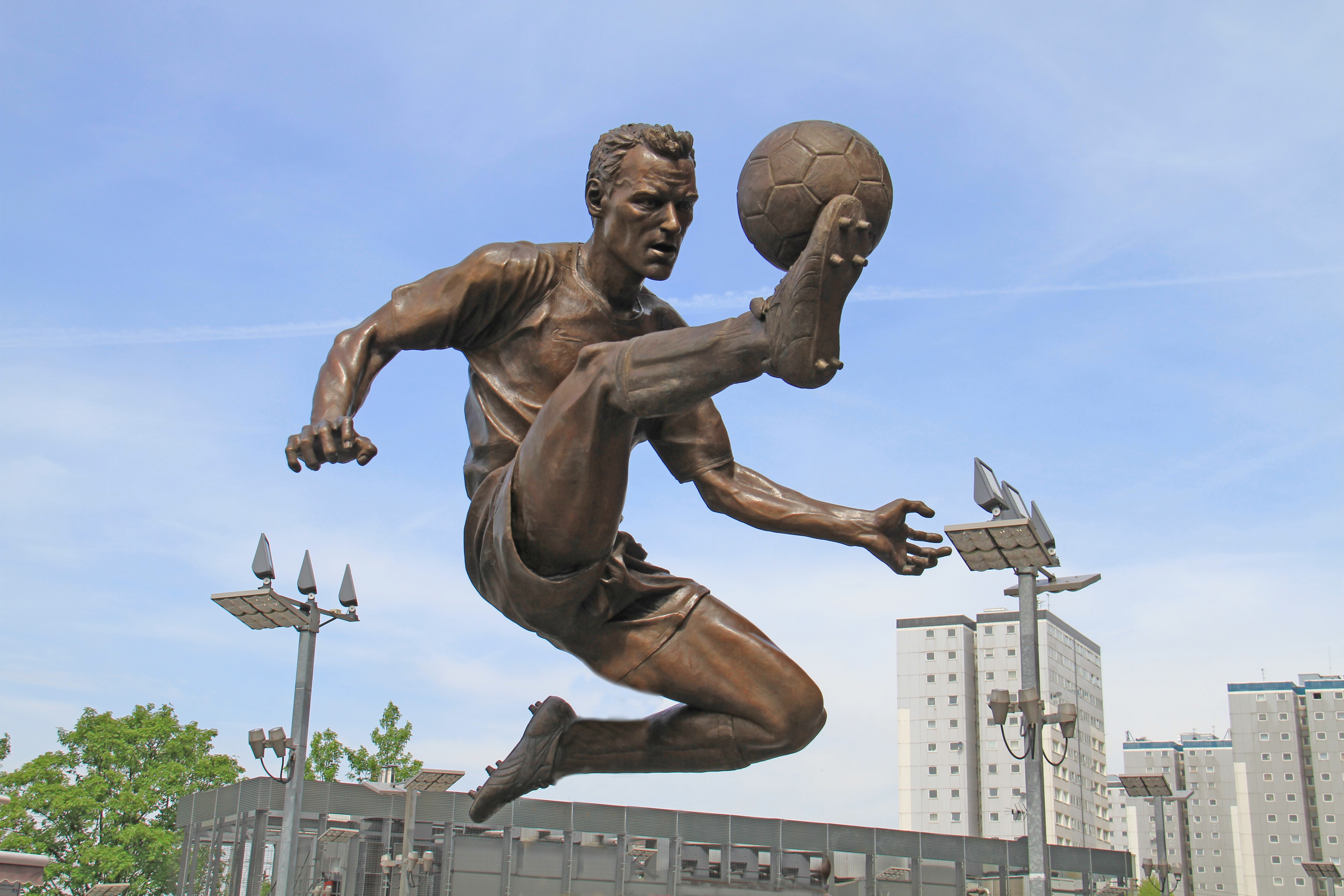 Dennis Bergkamp statue outside Emirates Stadium